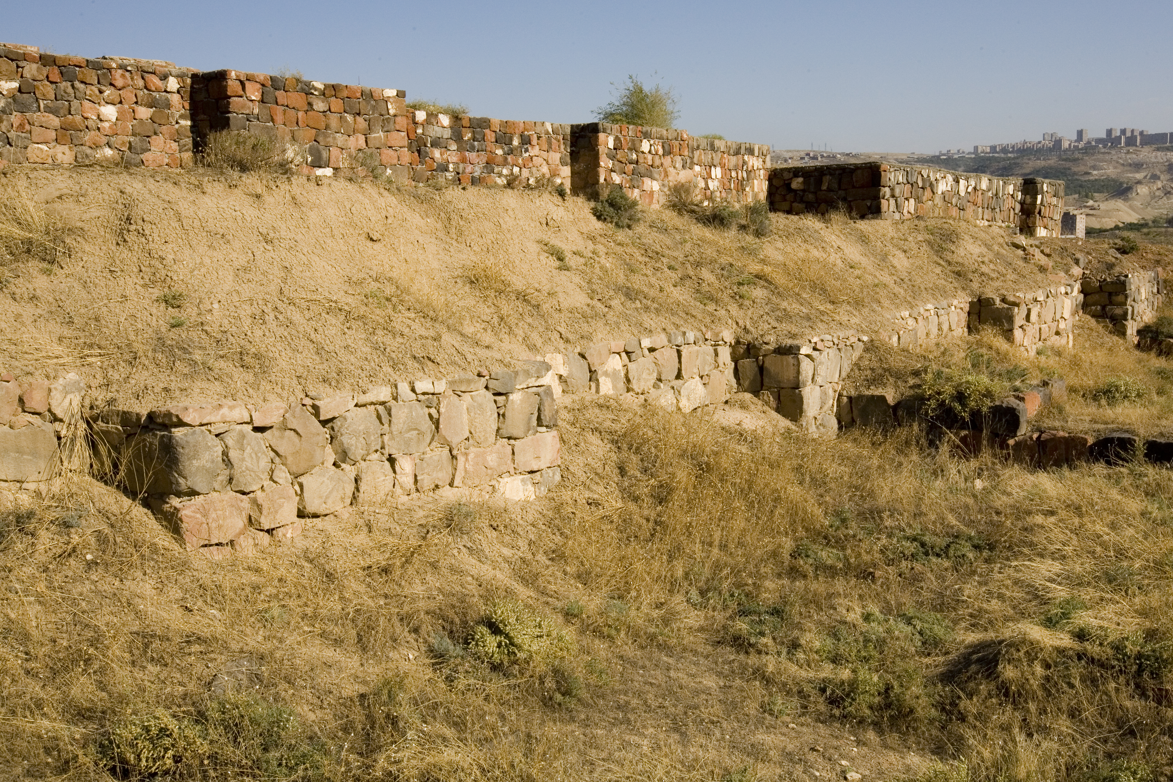 Erebuni, fortifications